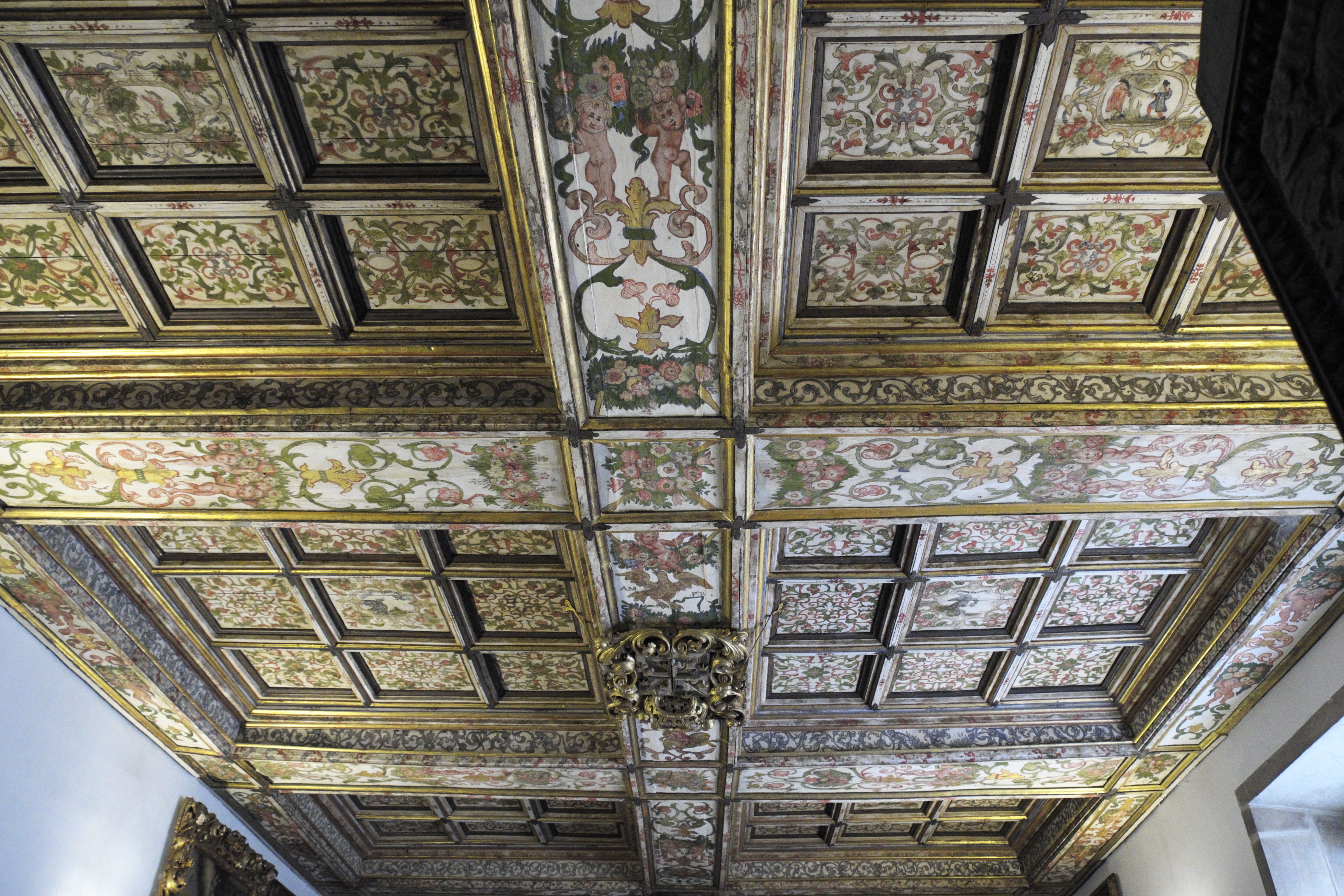 Klosterkirche São Gonçalo in Amarante im Distrikt Porto (Nordportugal), Sakristei aus dem 16. Jahrhundert, bemalte Holzdecke